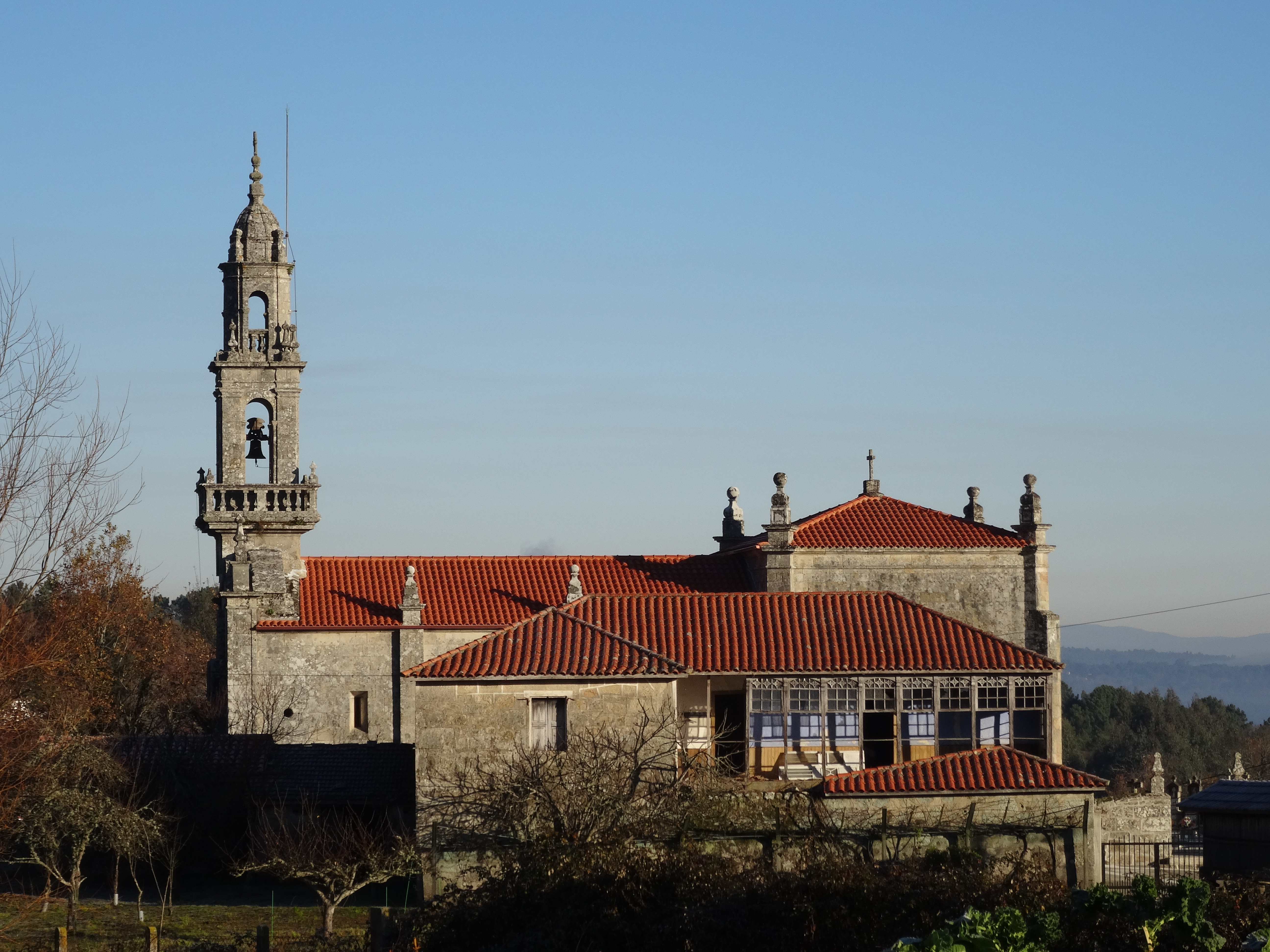 Ver título.